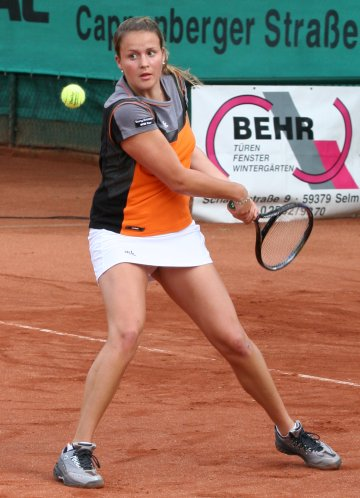 Tennisspielerin Tatjana Malek Fotograf/Zeichner: Paul B. Pätzold Kamera: Canon 20D Objektiv/Brennweite: Canon EF 70-200 1/4 L